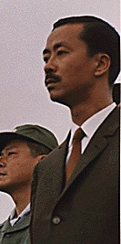 Nguyen Cao Ky